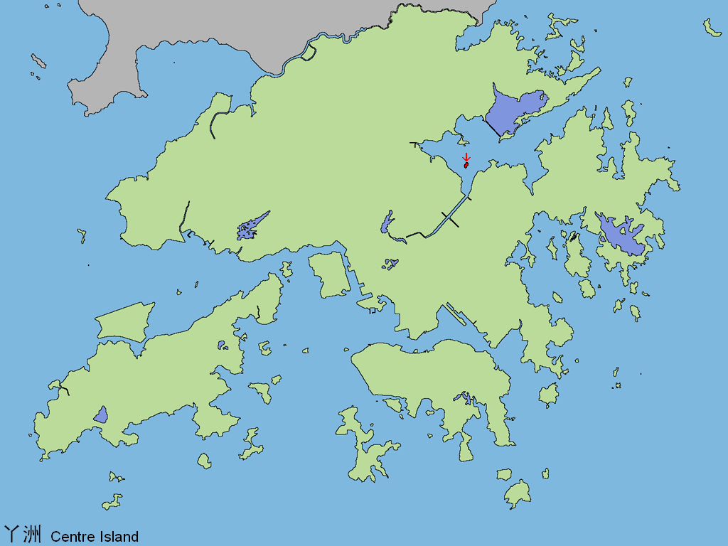 中文（香港）: 丫洲。